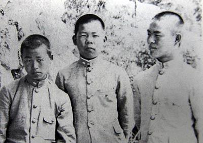 유년기의 김수환